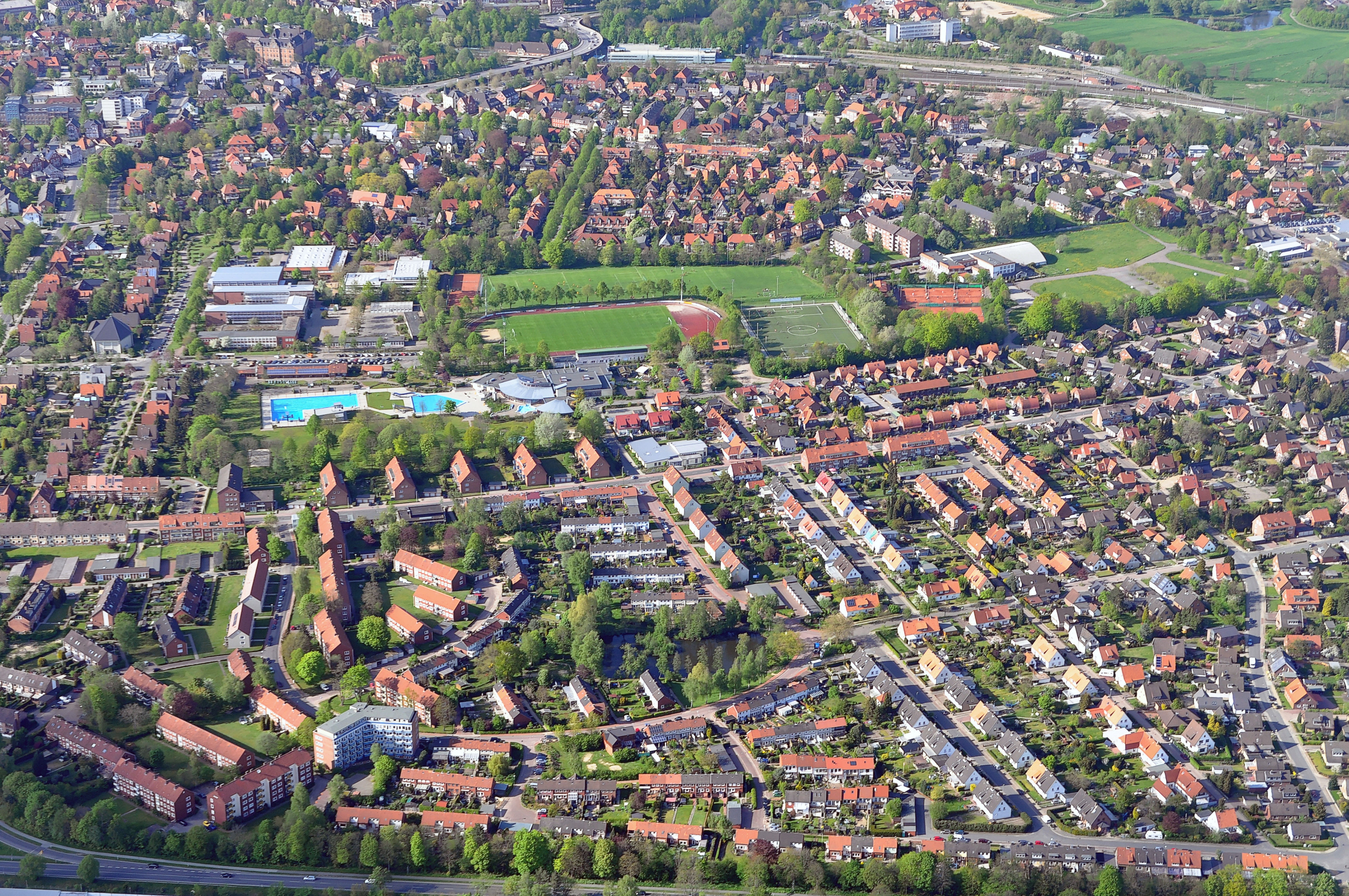 Das Sachsenviertel in Stade. Luftbilder von der Nordseeküste 2012-05